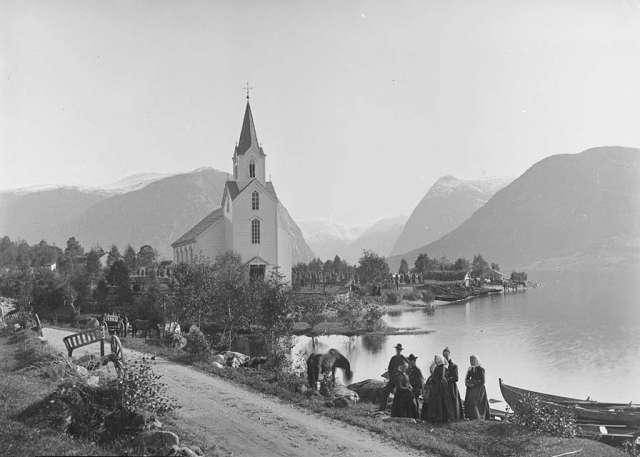 Helgheim kyrkje i Jølster, ved Jølstravatnet